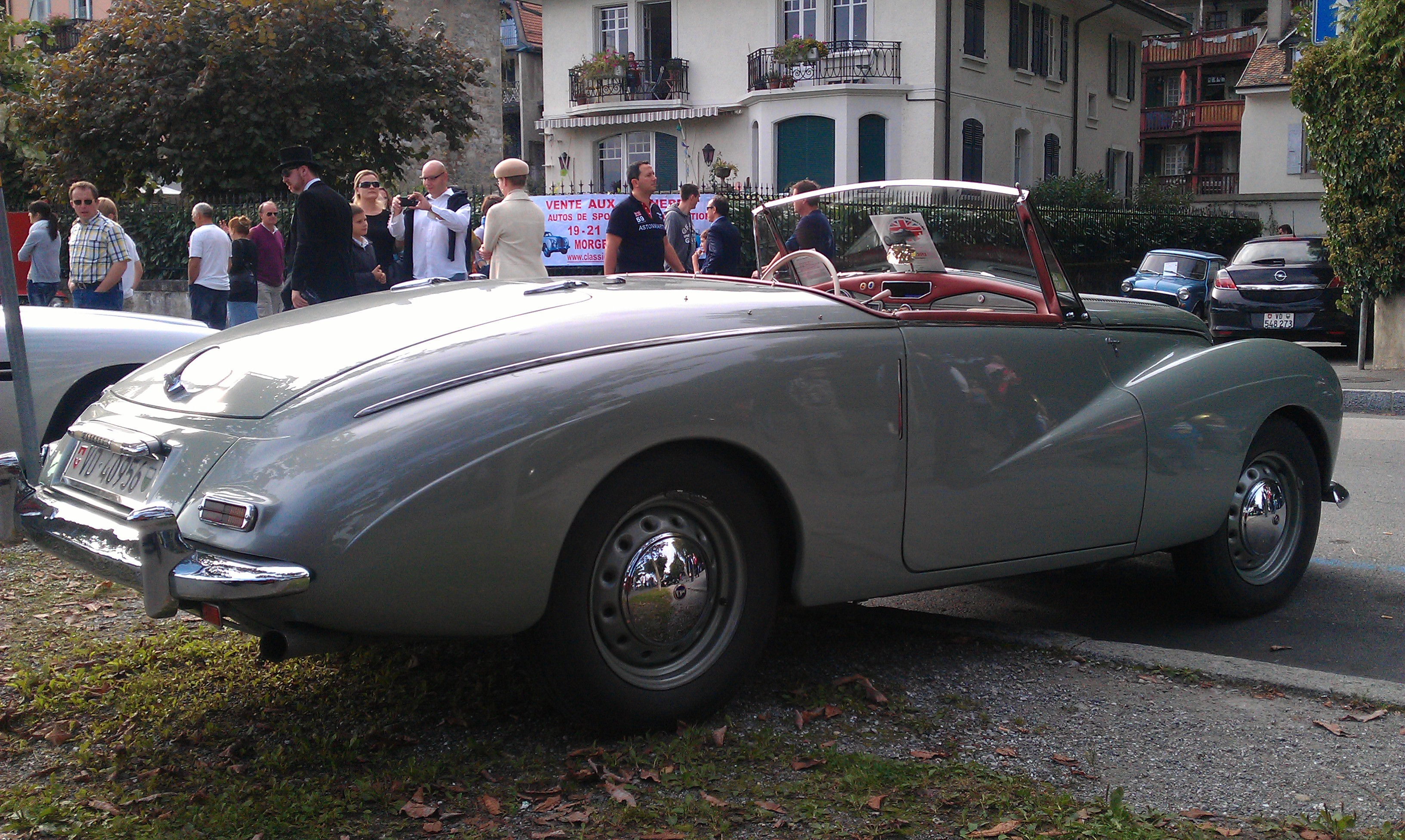 1954 Sunbeam Alpine Mk1